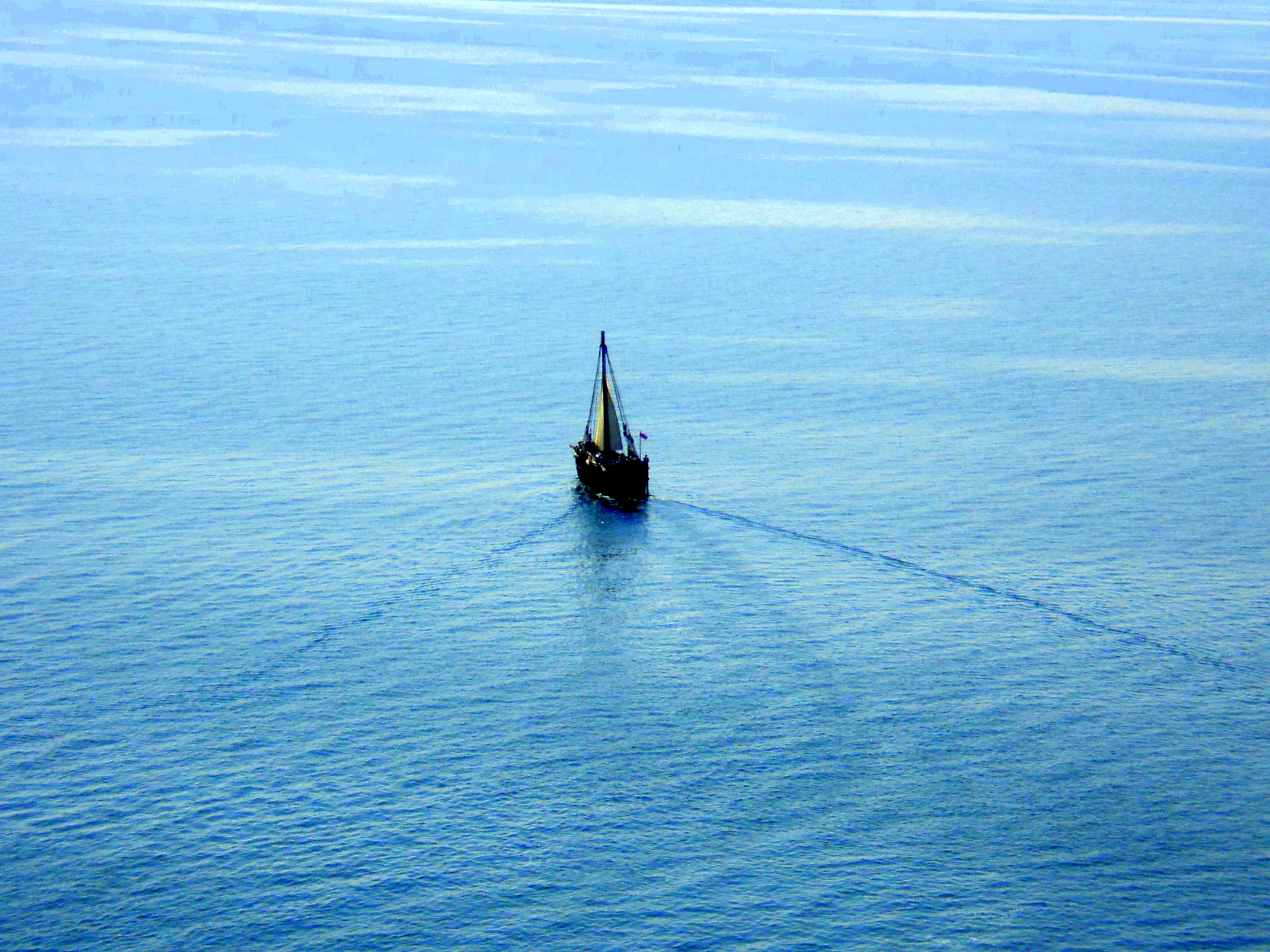 «Սևան» ազգային պարկ